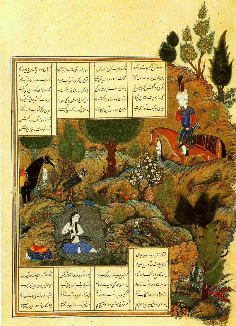 Shaykhi.Хосров_наблюдает_за_купанием_Ширин._Хамсе,_Низами._1480е_Топкапы